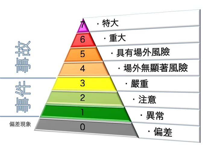 國際核能事件分級表